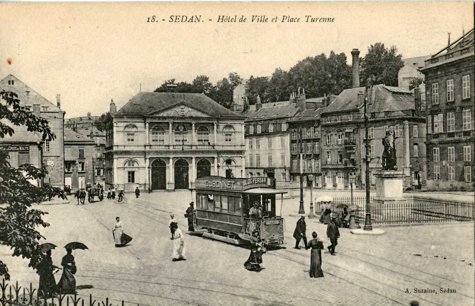 Carte postale ancienne éditée par A. Suzaine à Sedan n°18 : SEDAN - Hôtel de Ville et Place Turenne. Vue en gros plan d'une motrice électrique du Tramway de Sedan